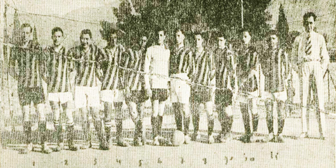 Η πρώτη ομάδα της ΑΕΚ το 1924. Δεξιά ο Απόστολος Νικολαΐδης.